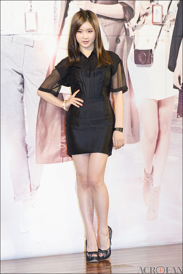 KBS W '애프터스쿨의 뷰티바이블' 제작발표회